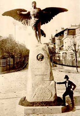 Esta estátua de bronze está localizada na Avenue de Longchamp, em St. Cloud, encomendada pelo Aeroclube da França representando o Deus Grego Ícaro, em homenagem a Santos Dumont. O monumento está situado numa praça próxima à antiga Aeroestação de St. Cloud, onde Santos Dumont realizava suas experiências com os "mais pesados que o ar", e foi inaugurada em 19 de outubro de 1913.